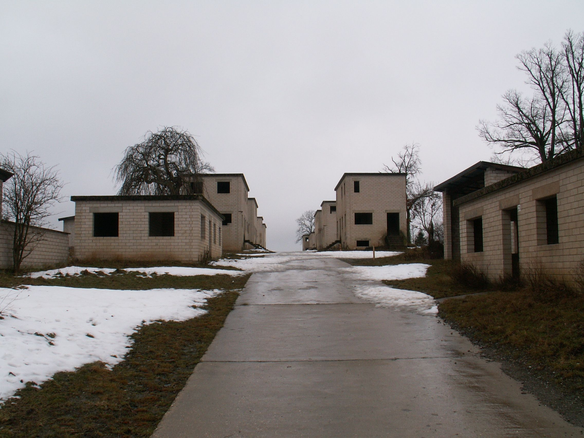 Übungshäuser der Wüstung Wollseifen auf dem Truppenübungsplatz Vogelsang